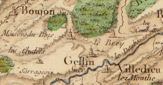 Carte de Cassini n°147 (Nozeroy, zoom sur le Brey), 1759.